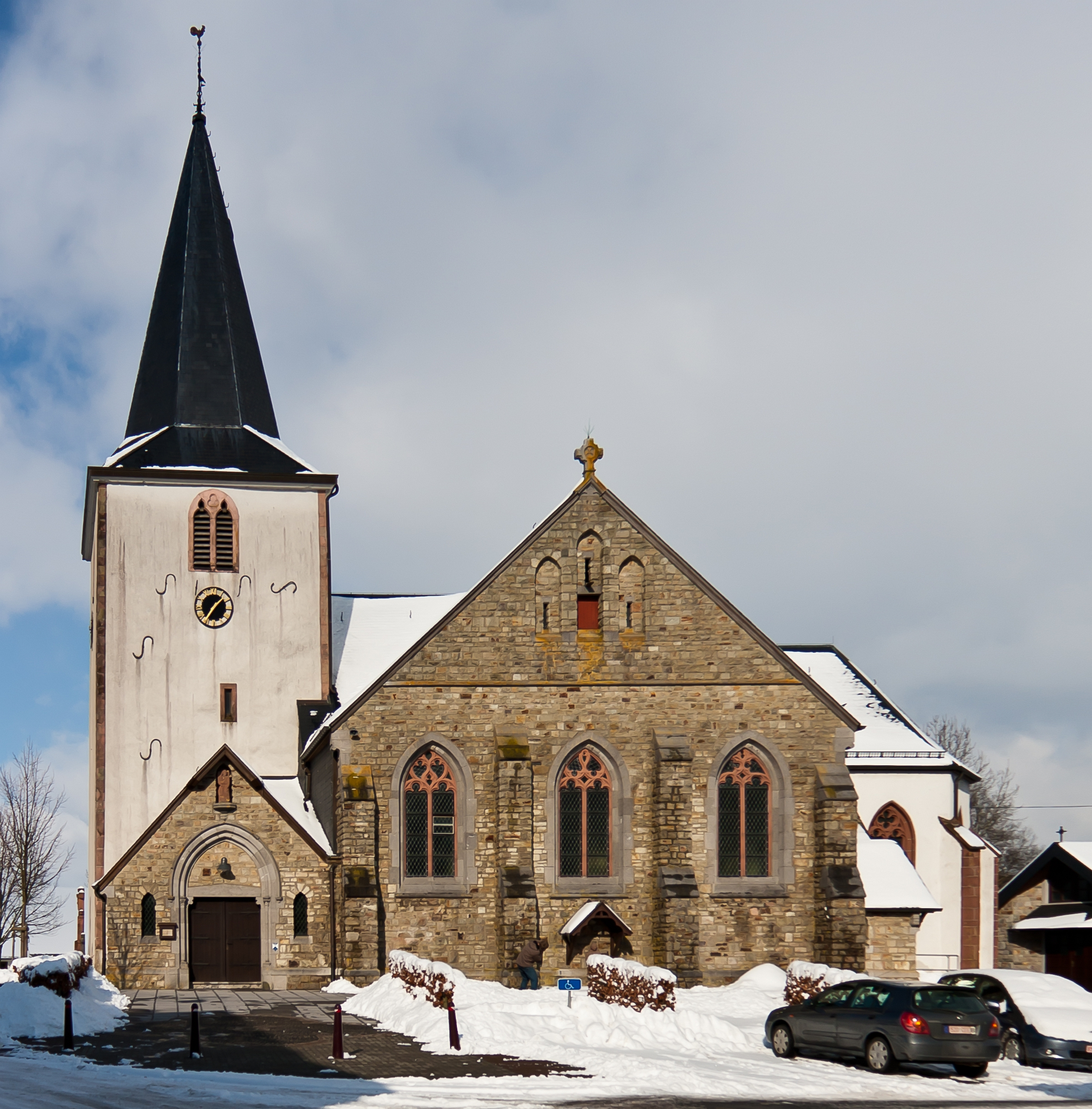 St. Eligius Kirche, Büllingen, Belgien